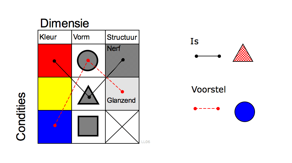 Morfologisch overzicht. Juli 2006 Laurens van Lieshout.